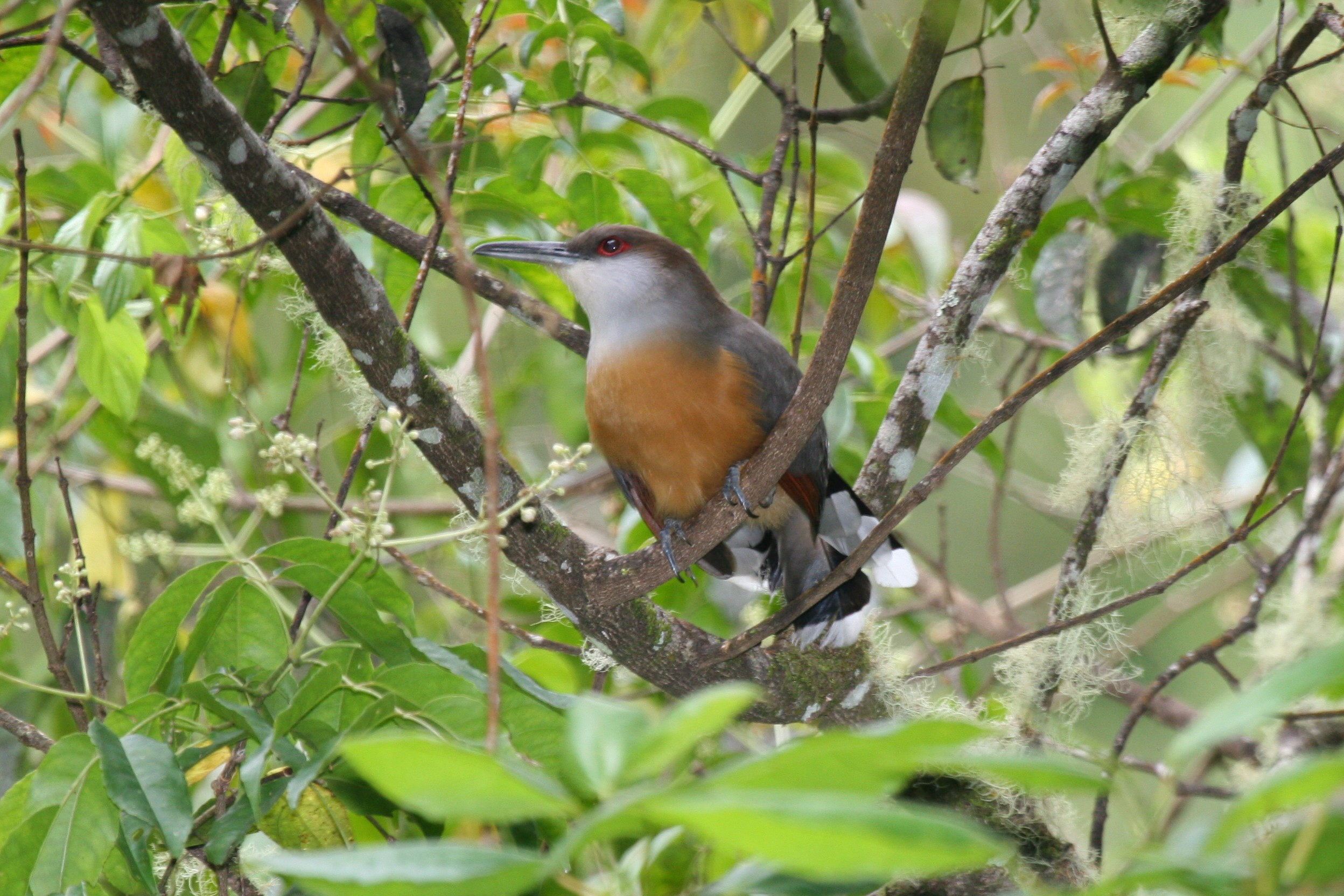 Jamaican Lizard-cuckoo (Saurothera vetula)